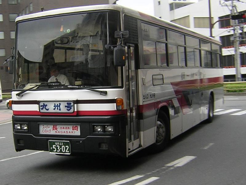 登録番号 福岡22か53-02 九州急行バス所属 九州号用 2005年8月1日 西鉄天神バスセンター入口付近にて撮影